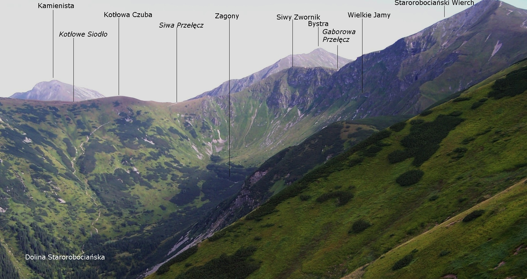 Górna część Doliny Starorobociańskiej